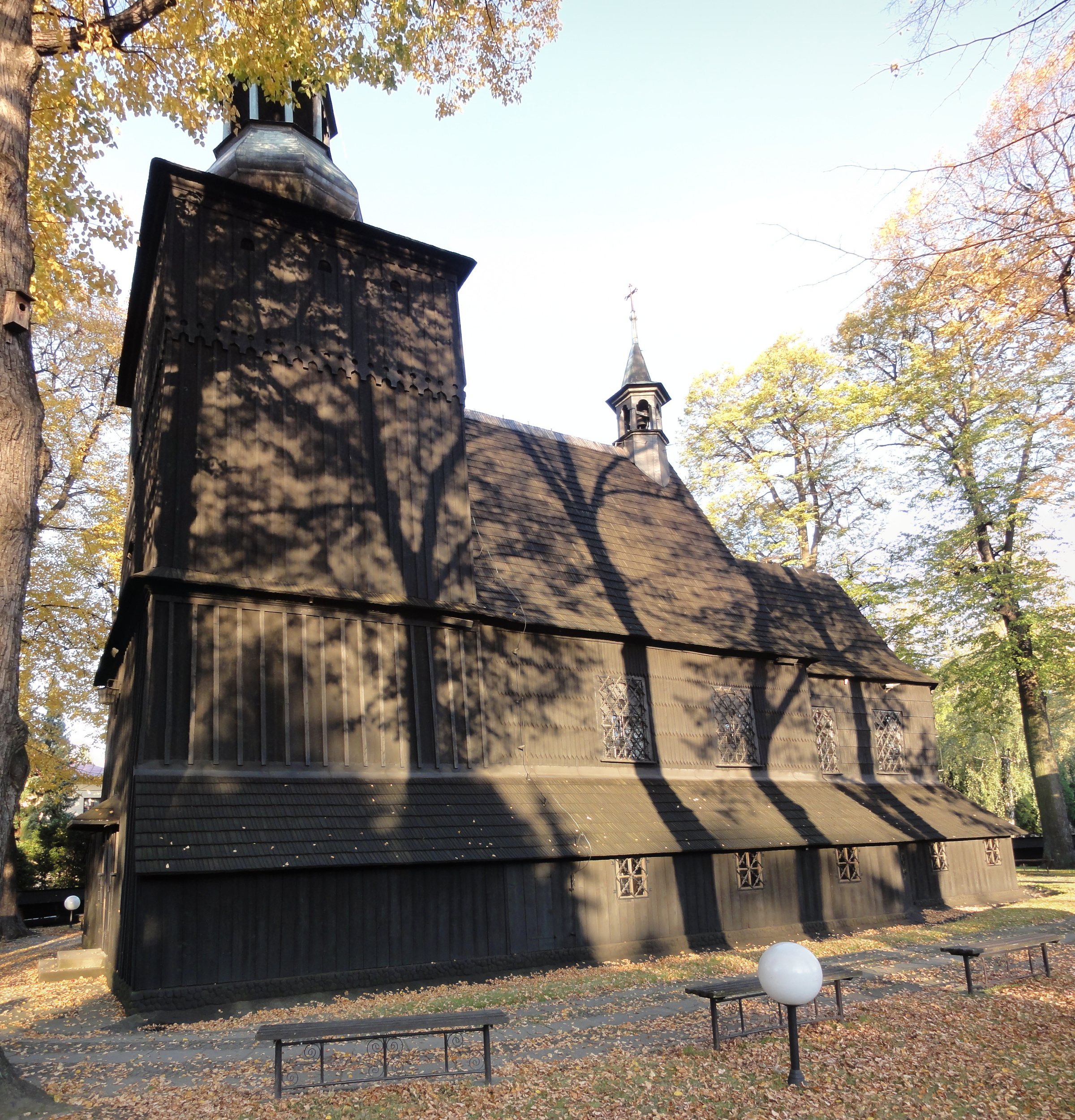 Bielsko-Biała Mikuszowice (Krakowskie) - kościół św. Barbary